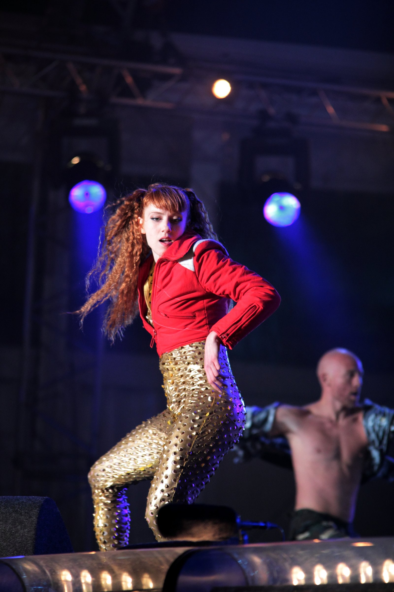 Club Guy & Roni II